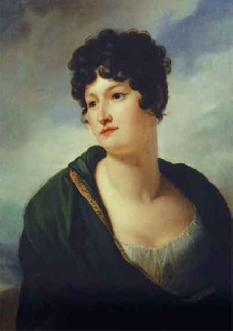 Варвара Станиславовна (Виктория Октавия) Бахметева(1782—1826), урожденная Потоцкая. 1 брак с графом Октавием Шуазель-Гуфье.